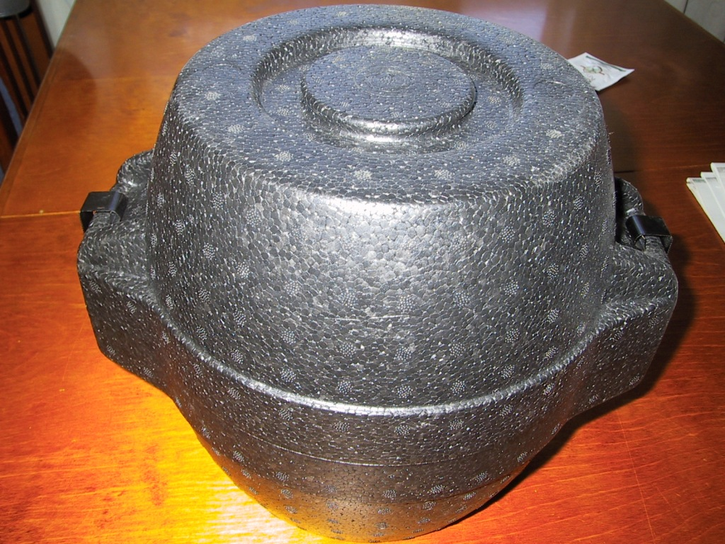 Aromipesä, polystyrene simmering dishwire.